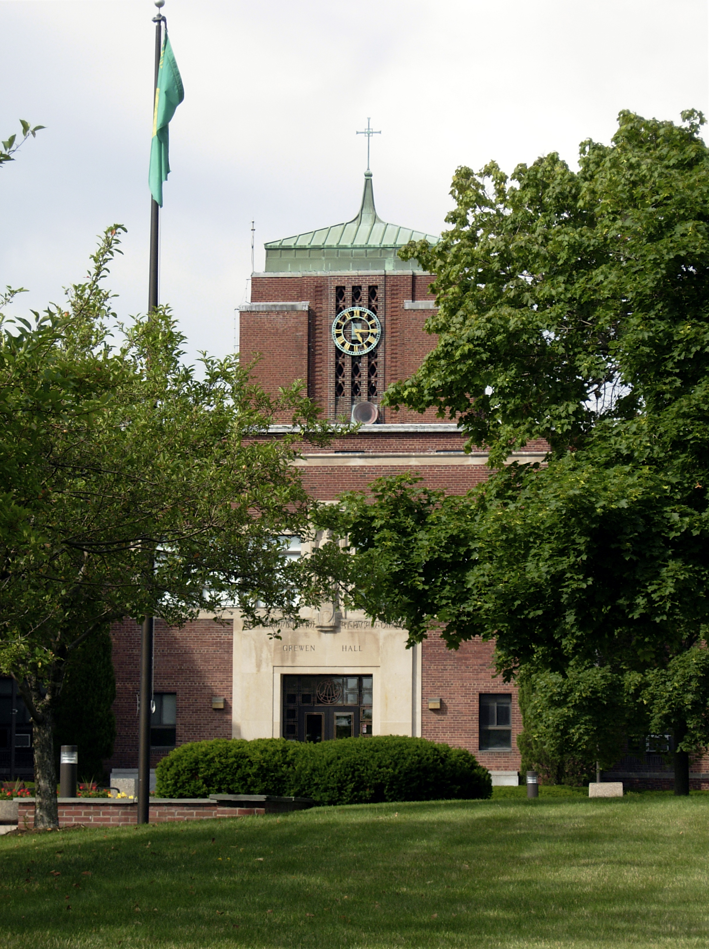 Grewen Hall, Le Moyne College, Syracuse, NY